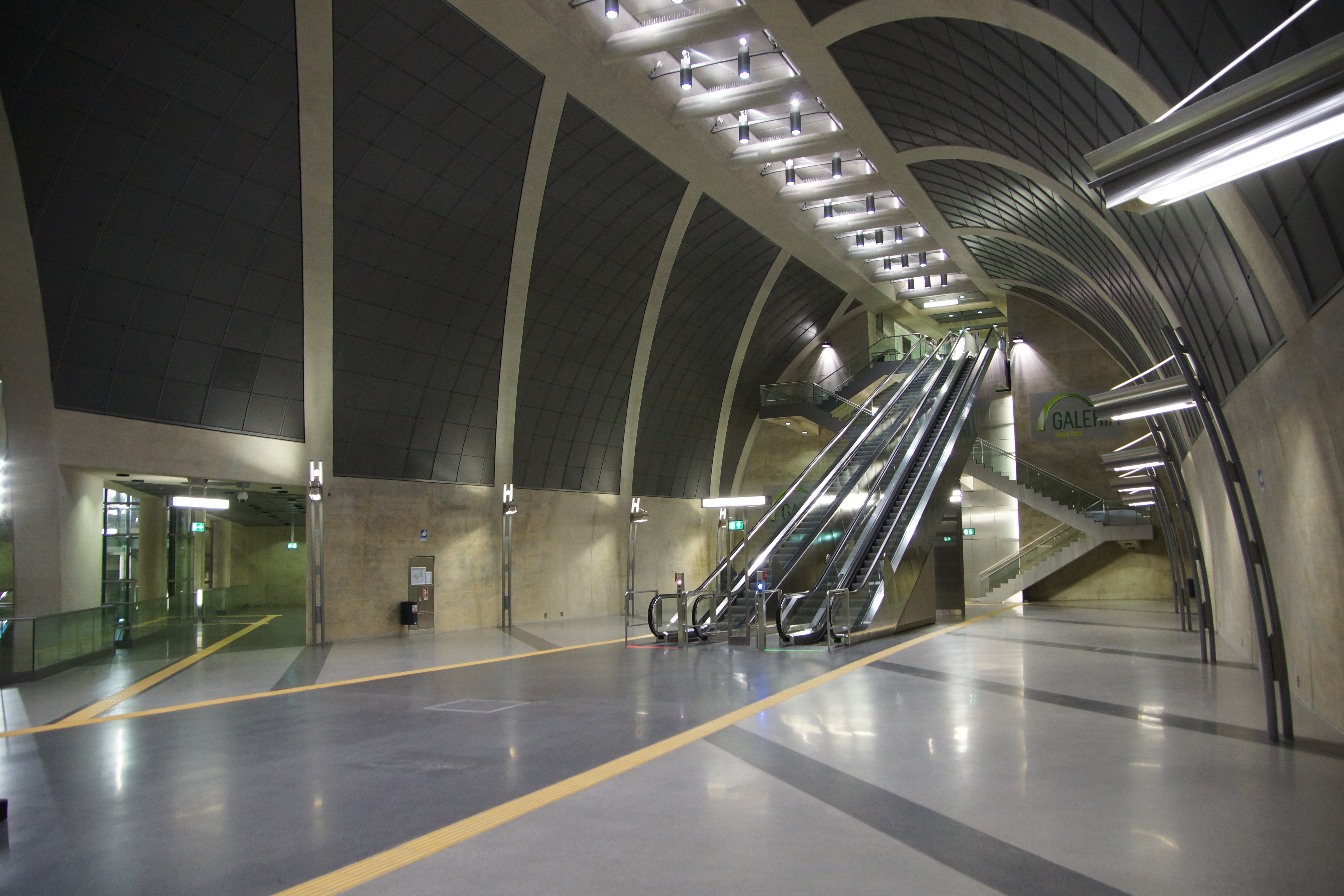 unterirdische Stadtbahnhaltestelle Heumarkt der Nord-Süd-Stadtbahn, Zwischenebene